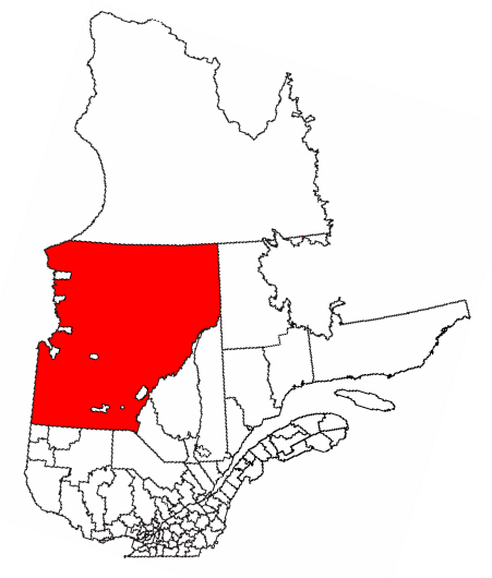 Territoire de la municipalité de la Baie-James (créée en 1971). Modification de la carte